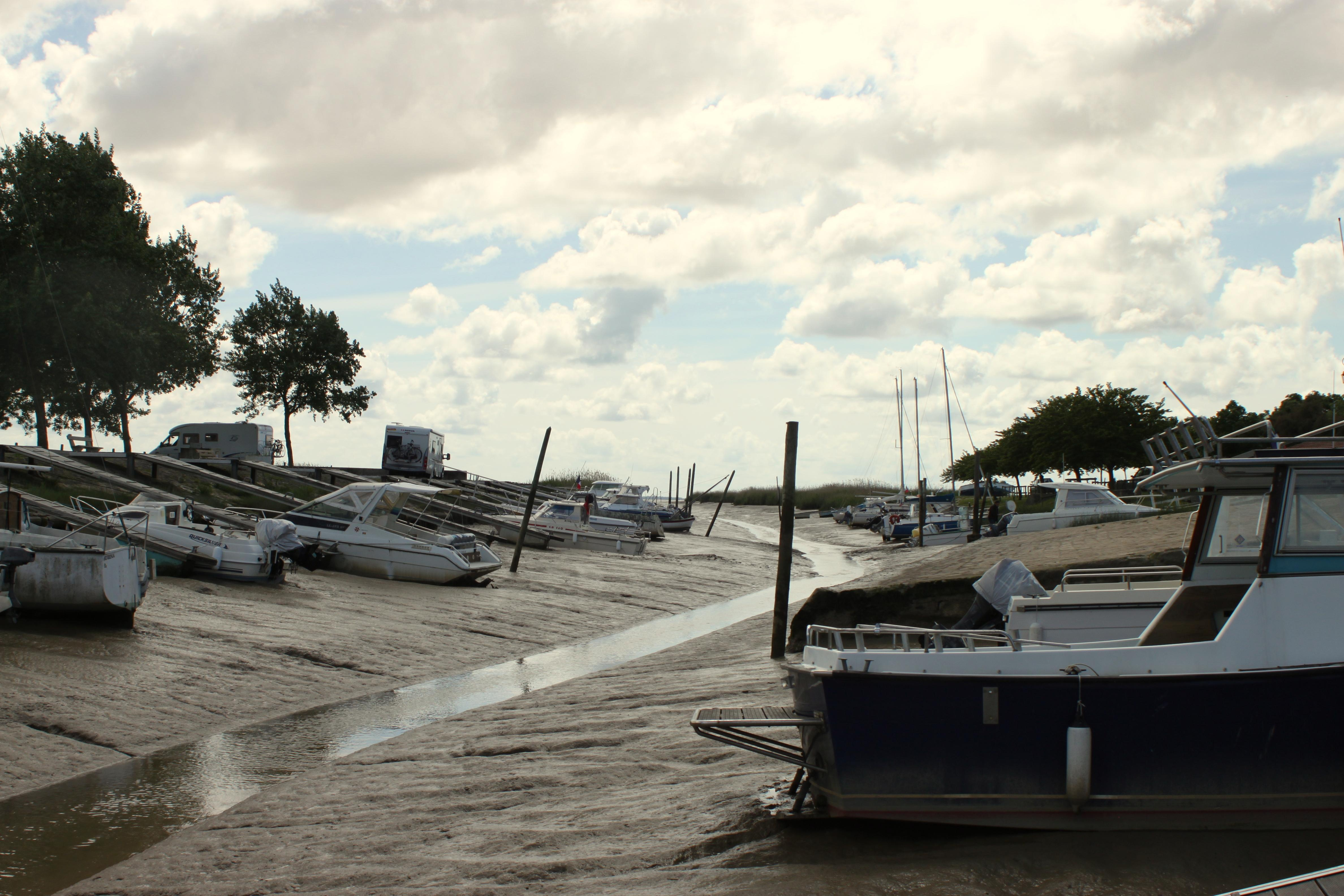 Le port, à marée basse, Fr-17-Chenac-Saint-Seurin-d'Uzet.